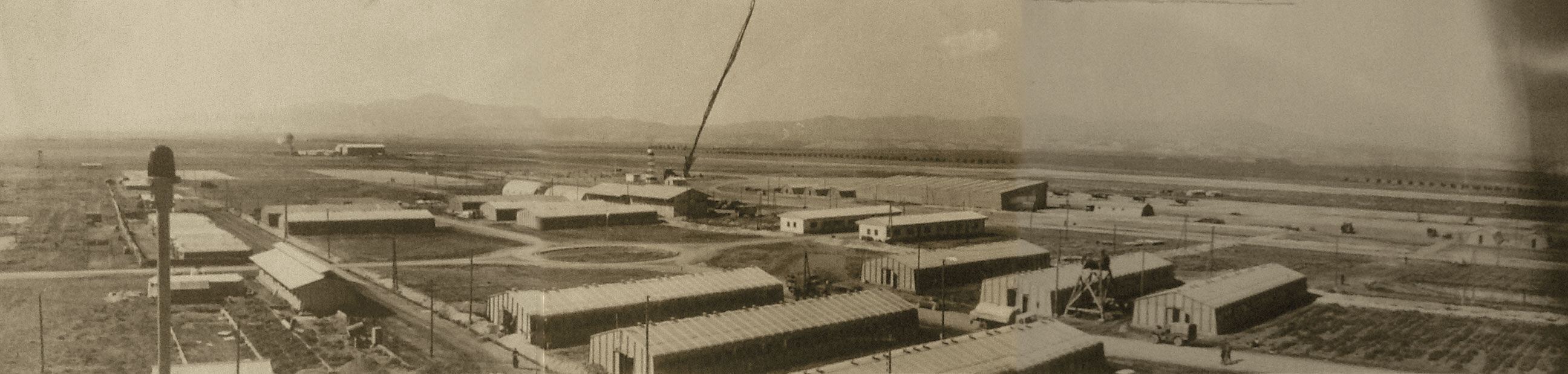 Aeroport international de Tlemsen pendant la guerre d Algerie